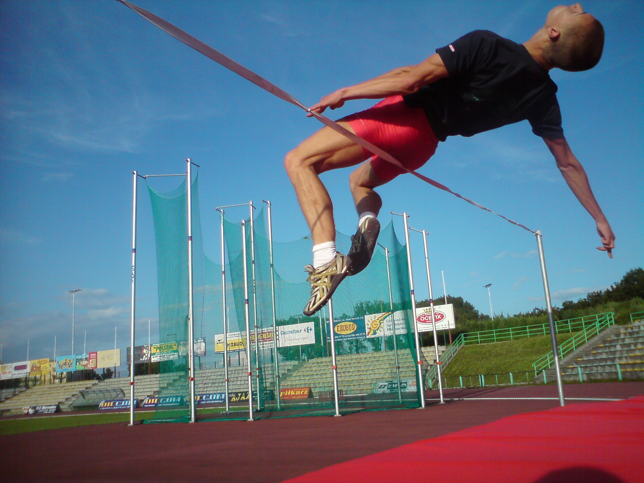 Piotr Śleboda na treningu w Grudziądzu.